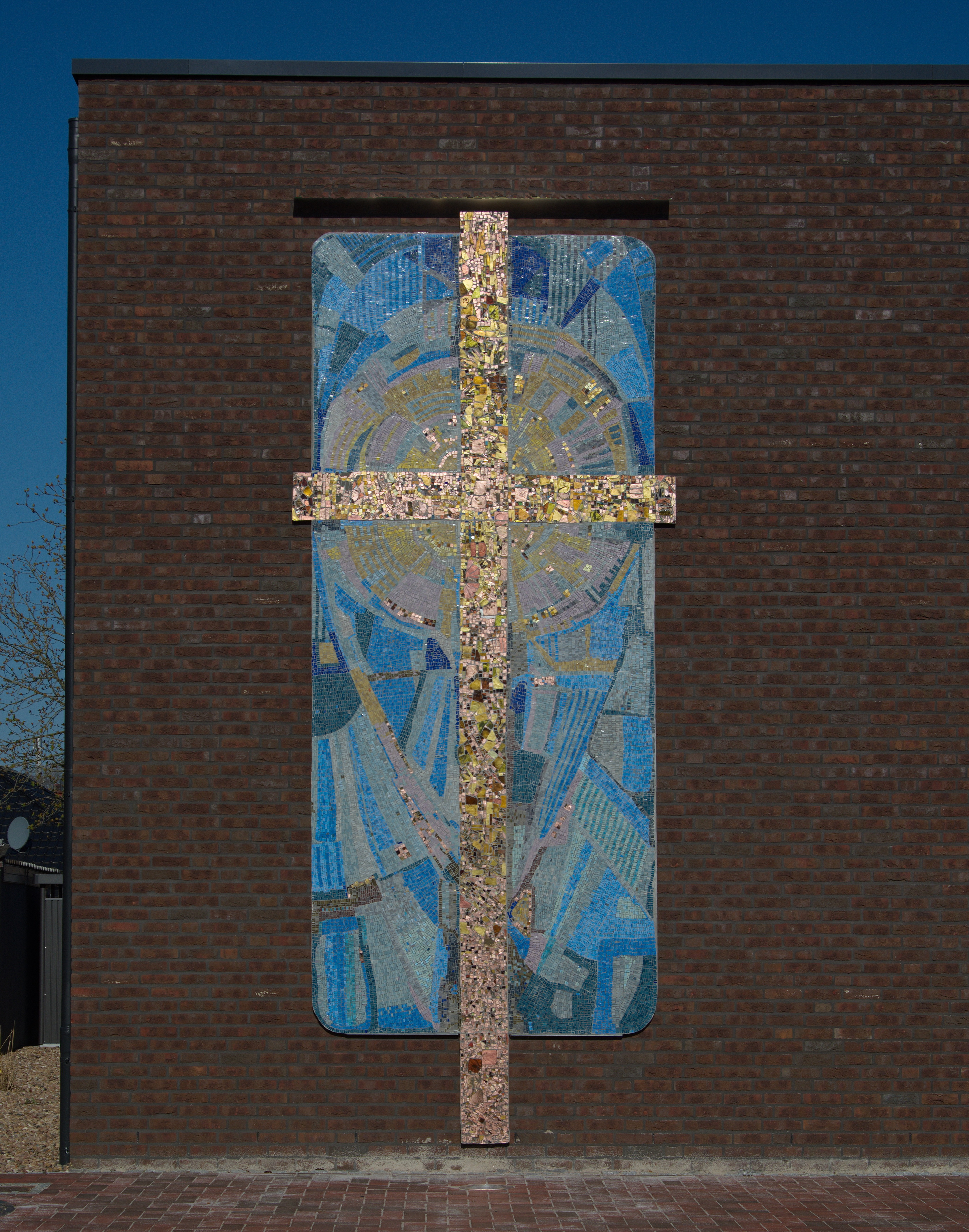 Georg Schmidt-Westerstede: Glasmosaik Kreuz (5,92 x 2,44 m). Wv-Nr. 2278, 1968. Seit 2019 an der Fassade der Neuapostolischen Kirche Westerstede, Kuhlenstraße. Vorher im Altarraum des alten Kirchengebäudes.